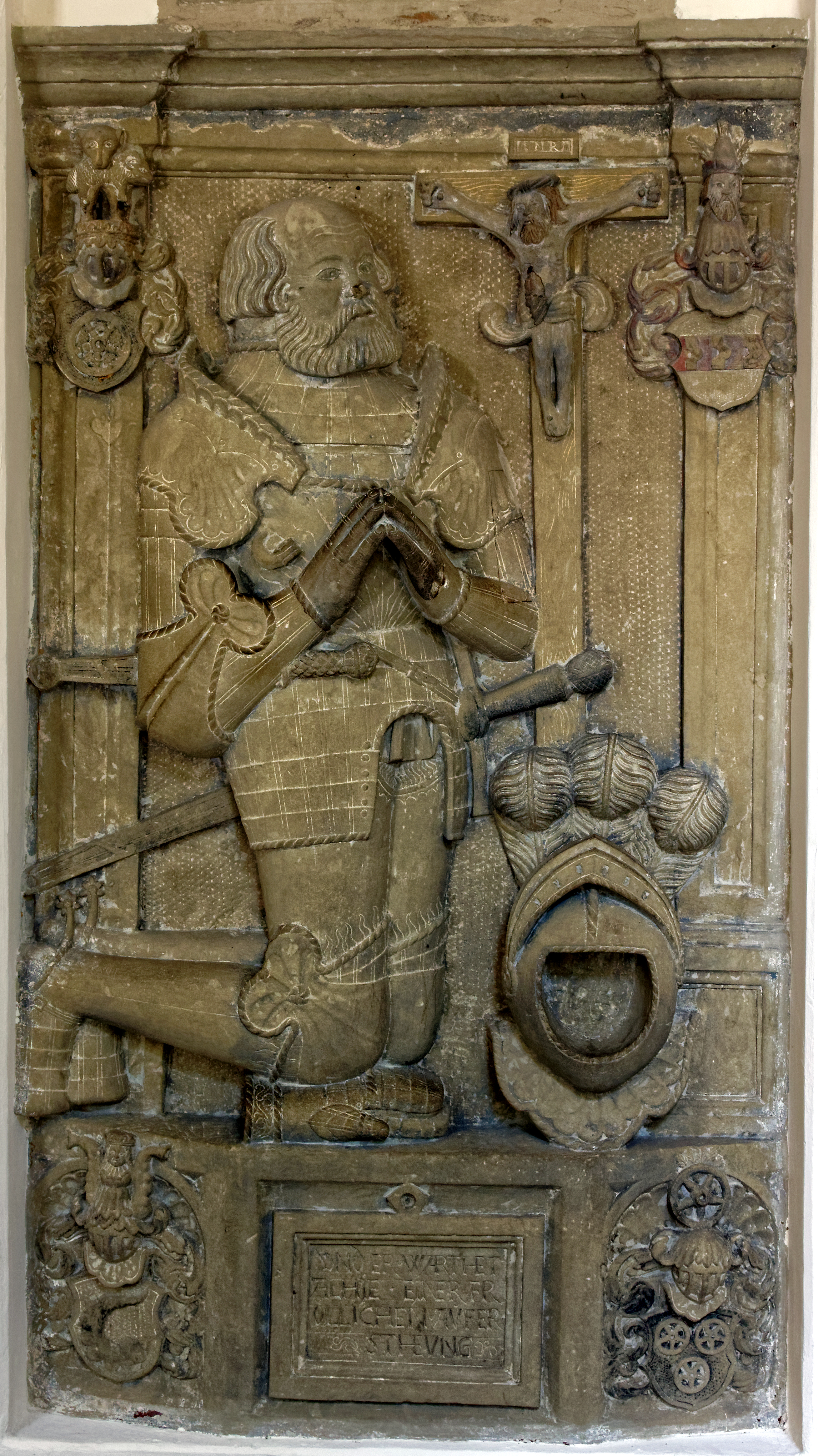 Der Kreuzgang Kloster Schöntal